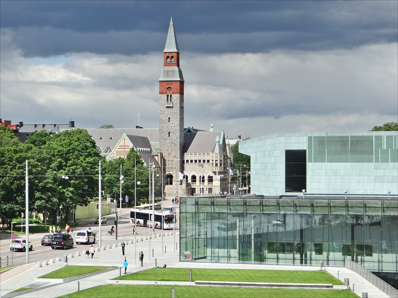 Le musée national a été conçu au tout début du 20ème siècle par les architectes : Gesellius, Lindgren et Saarinen dans le style art nouveau romantique national. voir les célèbres peintures murales du musée (photos dalbera) La maison de la musique a été ouverte à l'automne 2011, le bâtiment est l'oeuvre de LPR Architects, dirigé par l'architecte Marko Kivistö (acousticien : Yasuhisa Toyota)